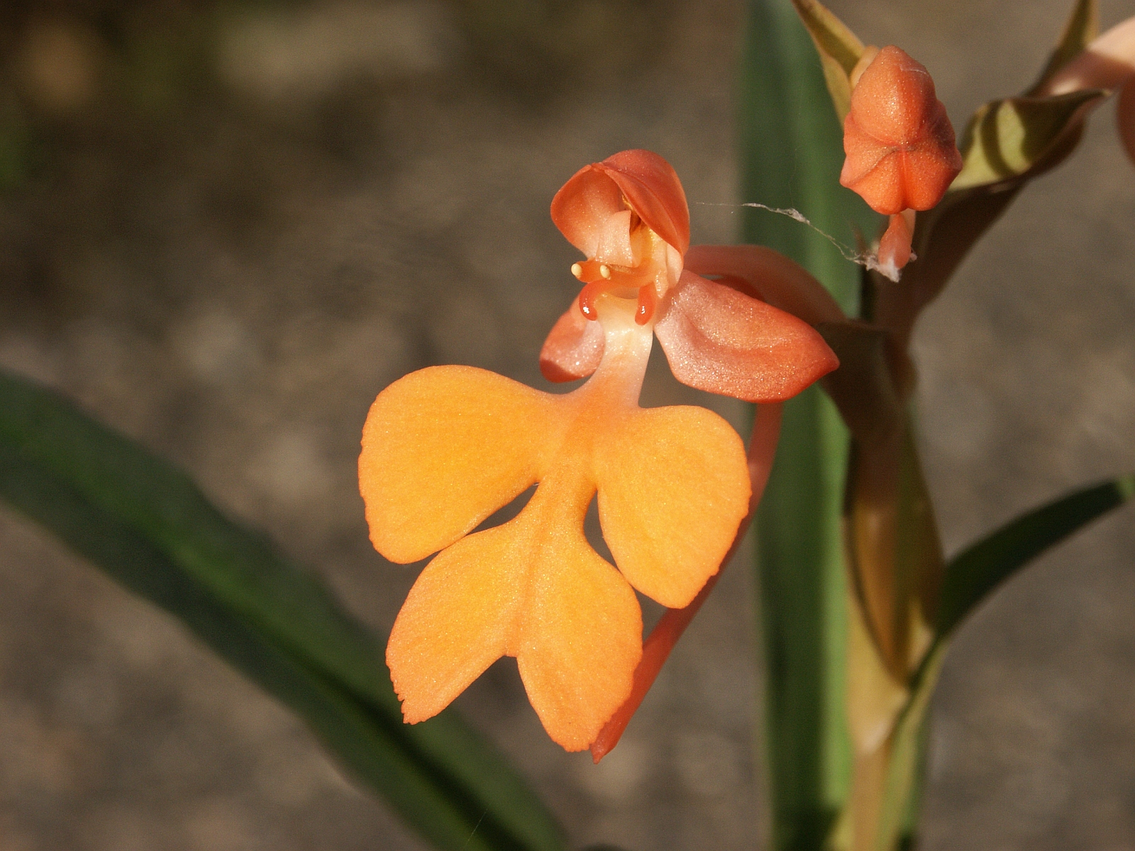 Habenaria rhodocheila, in cultivation